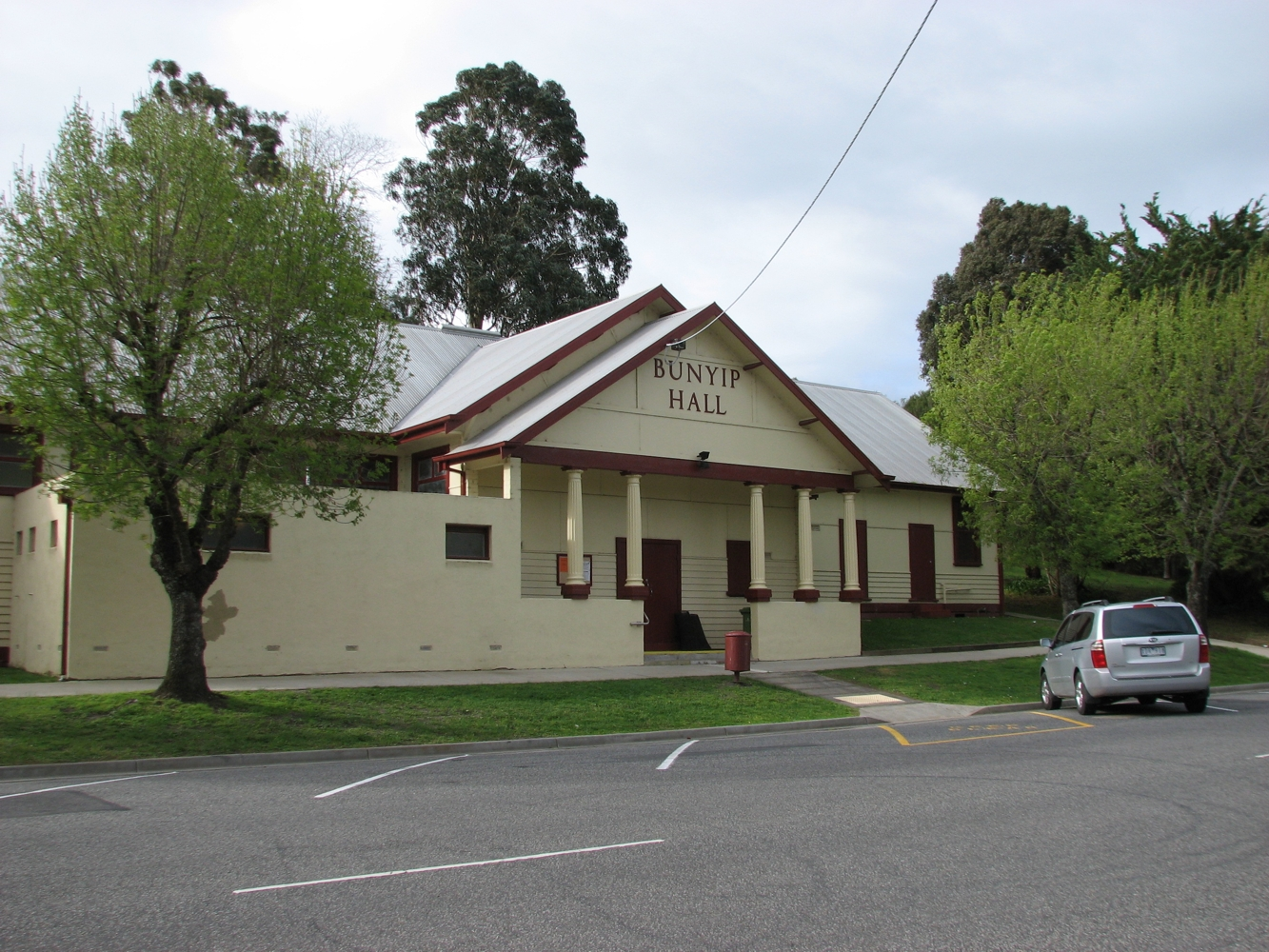 Bunyip Hall, Bunyip, Victoria, Australia